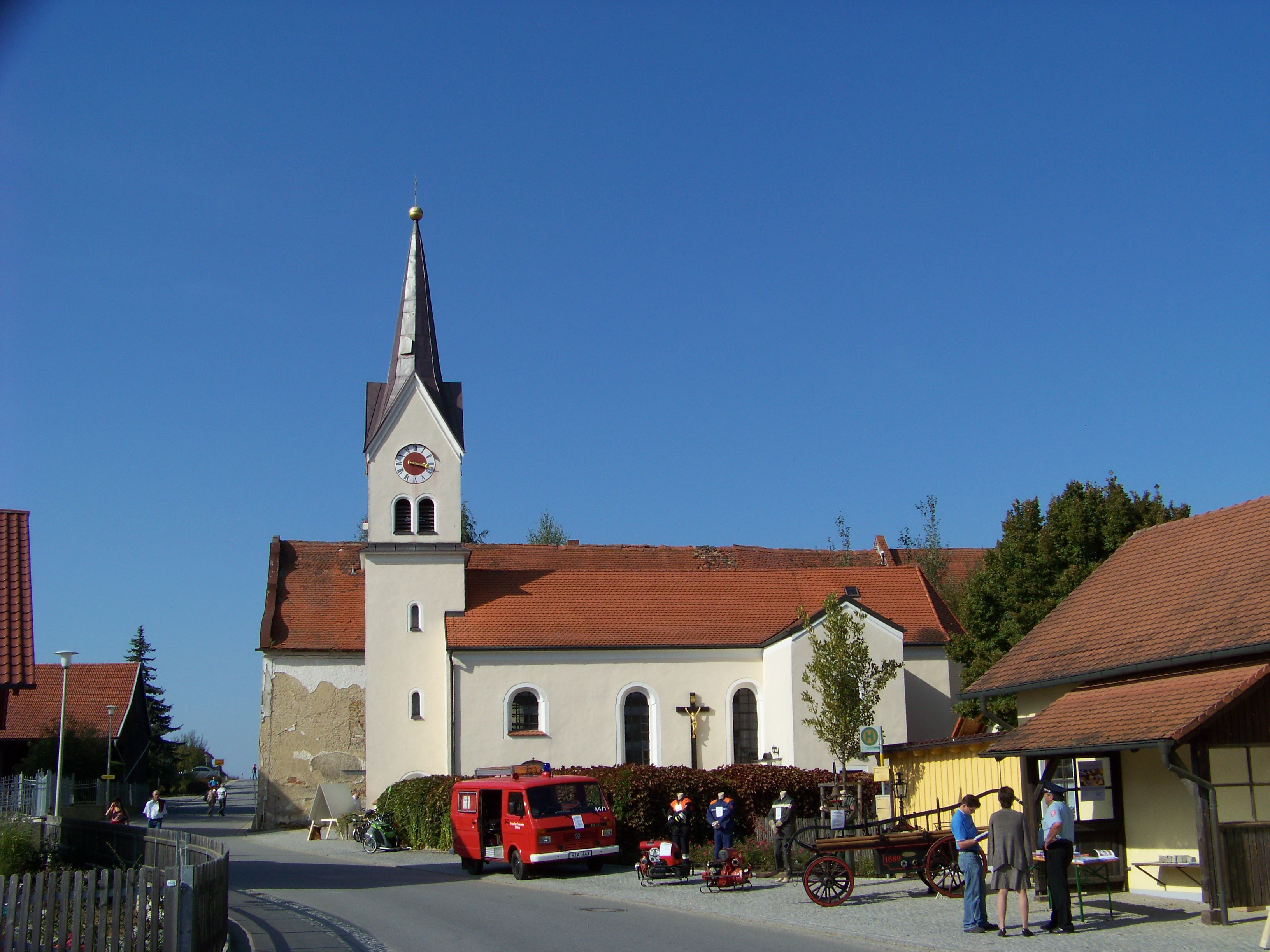 Aufhausen, Triftlfing, Ortsstraße 26. Katholische Filialkirche St. Johannes der Täufer, Saalbau mit abgewalmtem Satteldach und Westturm mit Spitzdach, 1687, Turm 19. Jahrhundert; mit Ausstattung.